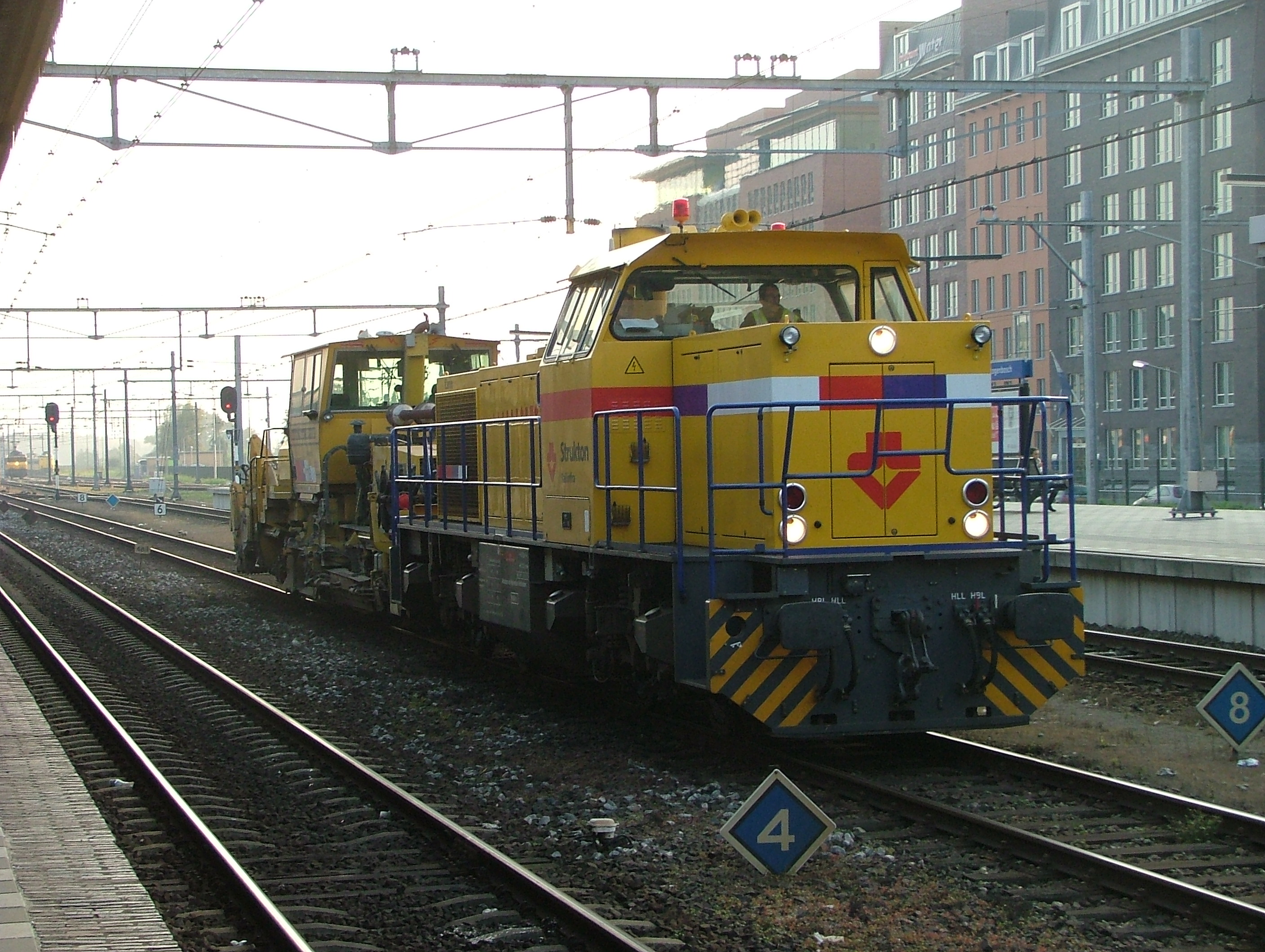 lokomotief Strukton. eigen materiaal Geert Smulders, Rosmalen